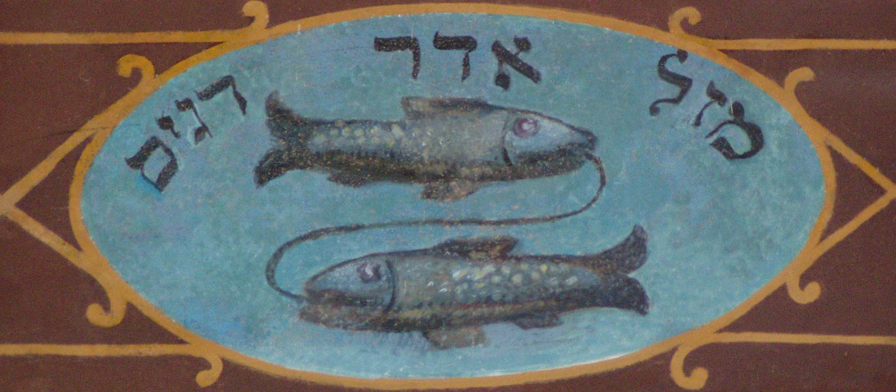 Znaki zodiaku na belkowaniu galerii dla kobiet synagogi Kupa w Krakowie